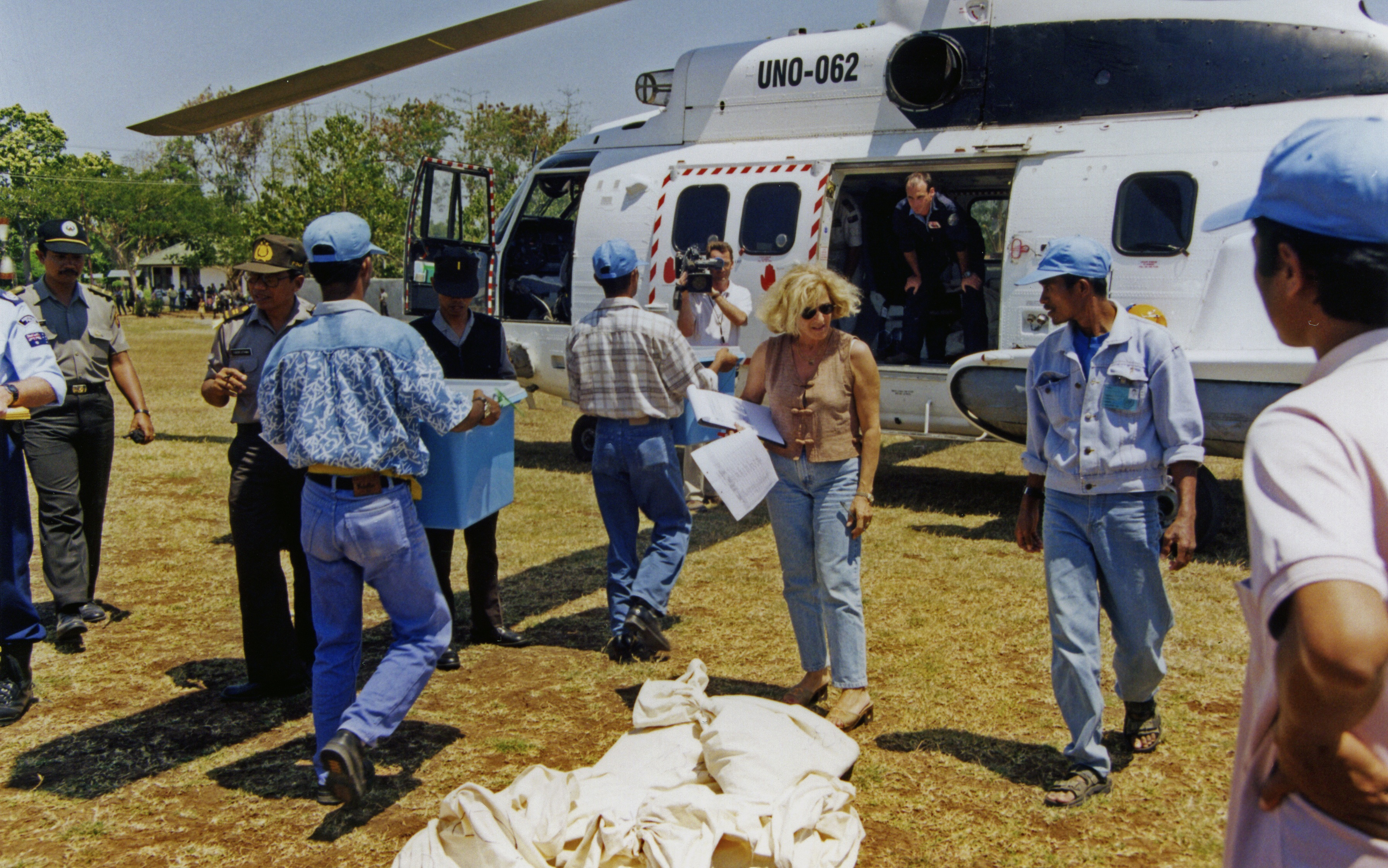 Transport der Stimmzettel vom Unabhängigkeitsreferendum in Osttimor 1999